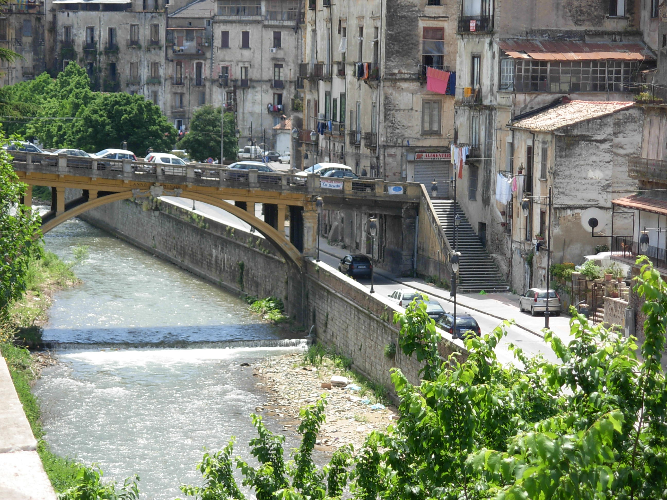 Ponte sul Crati